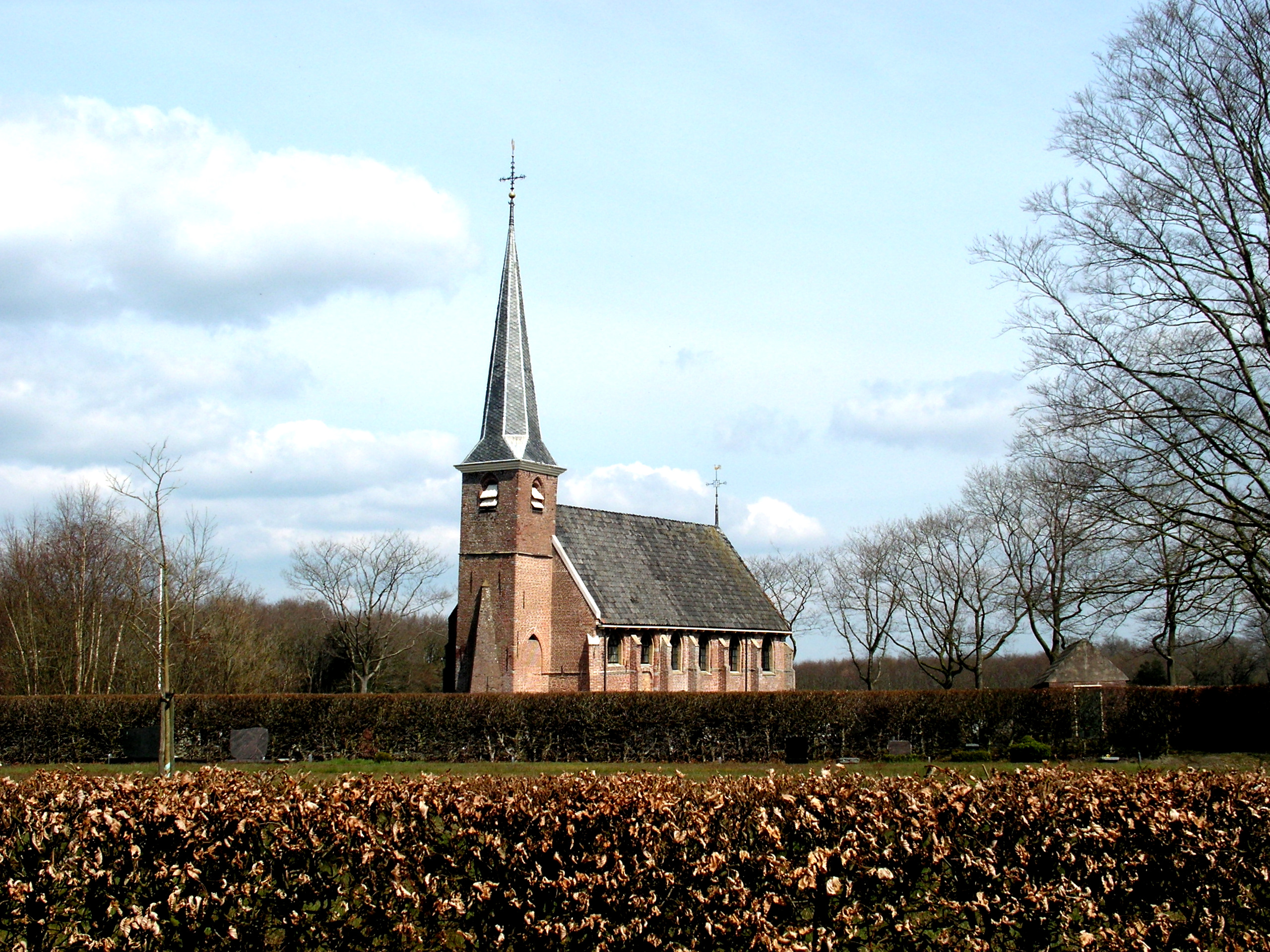 Nijeholtpade - Nicolaaskerk - dateert uit de 16e eeuw